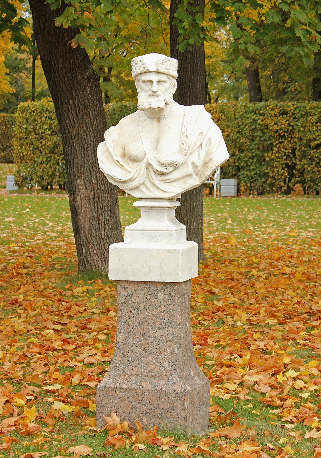 Бюст «Поро» (Санкт-Петербург и Лен.область, Пушкин, Эрмитажная аллея)